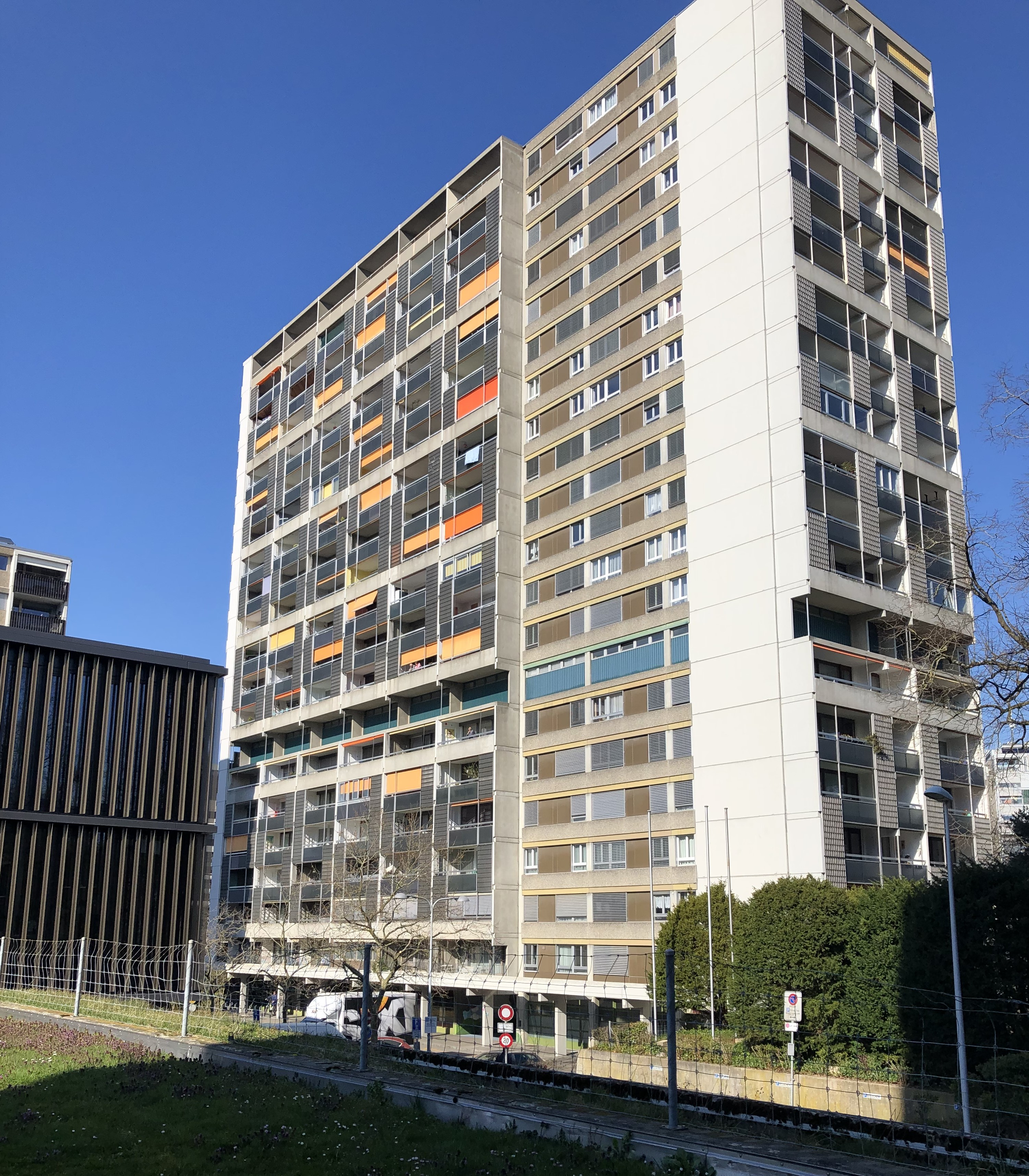 Fellergut Bebauung